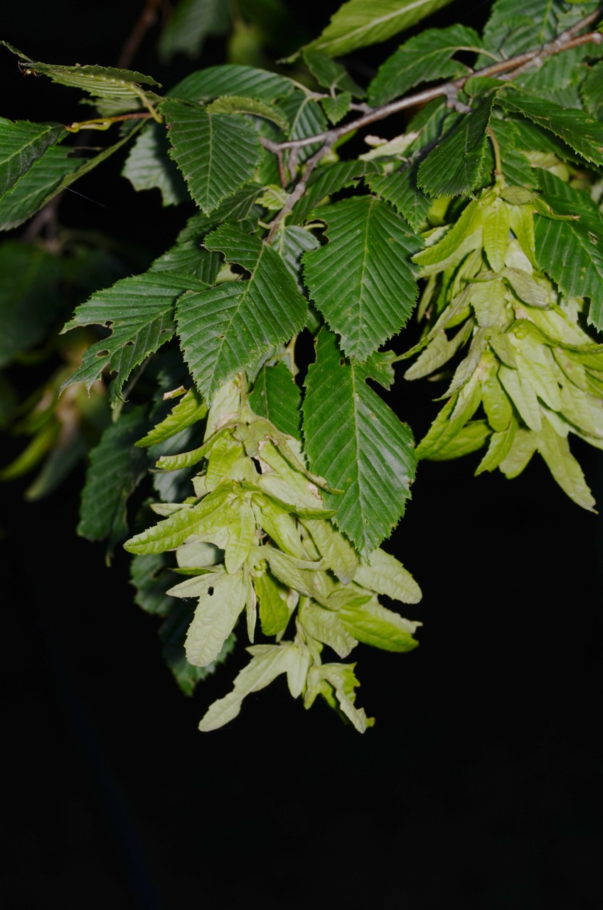 Carpinus betulus